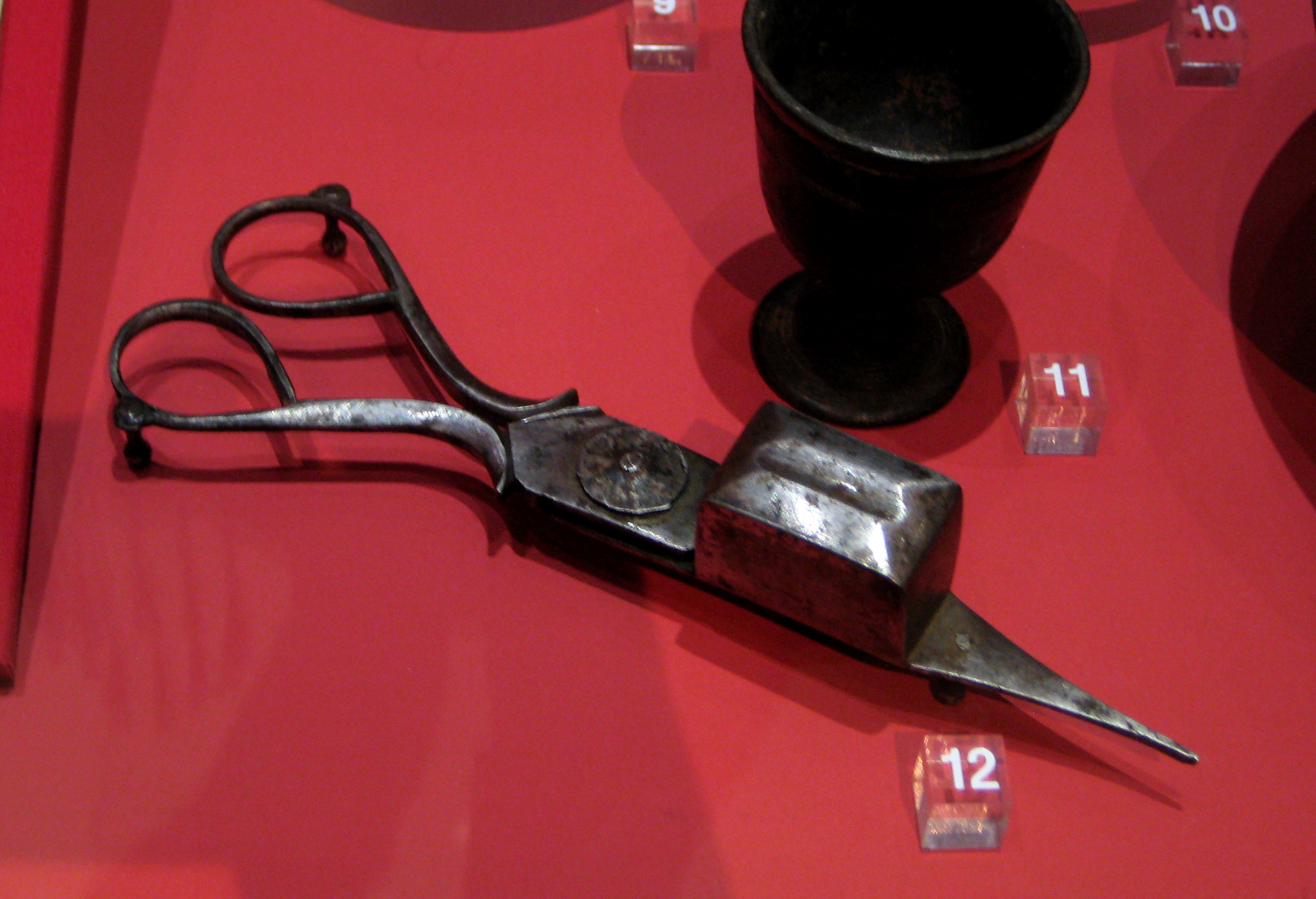 Съем свечной от нагара. Россия, Тула, 1-я четверть 19 века. Сталь, ковка. Музей "Бородинская панорама" Accessory to remove snuff from candles. Russia, Tula.